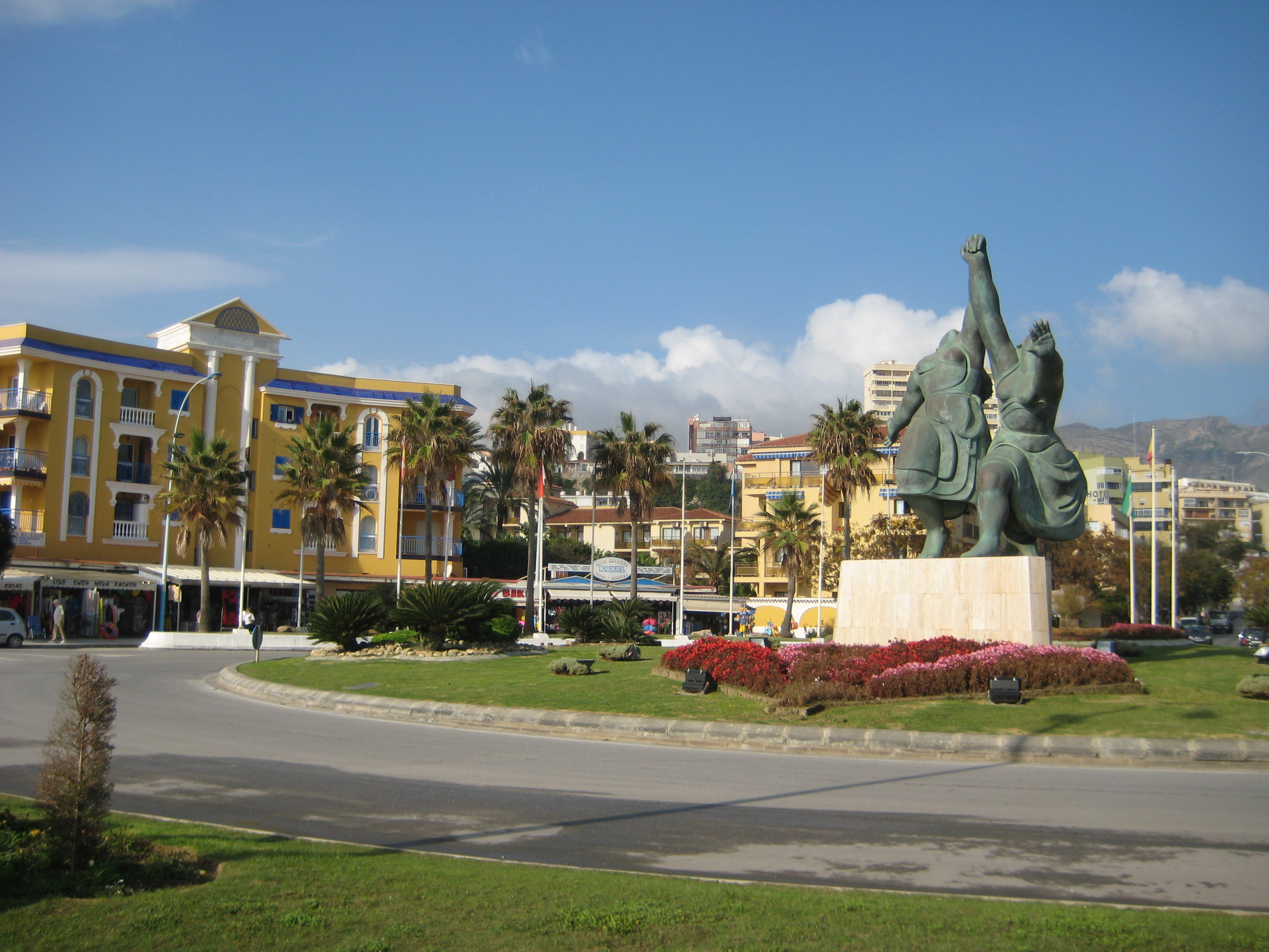 Deel vu der Strandpromenade